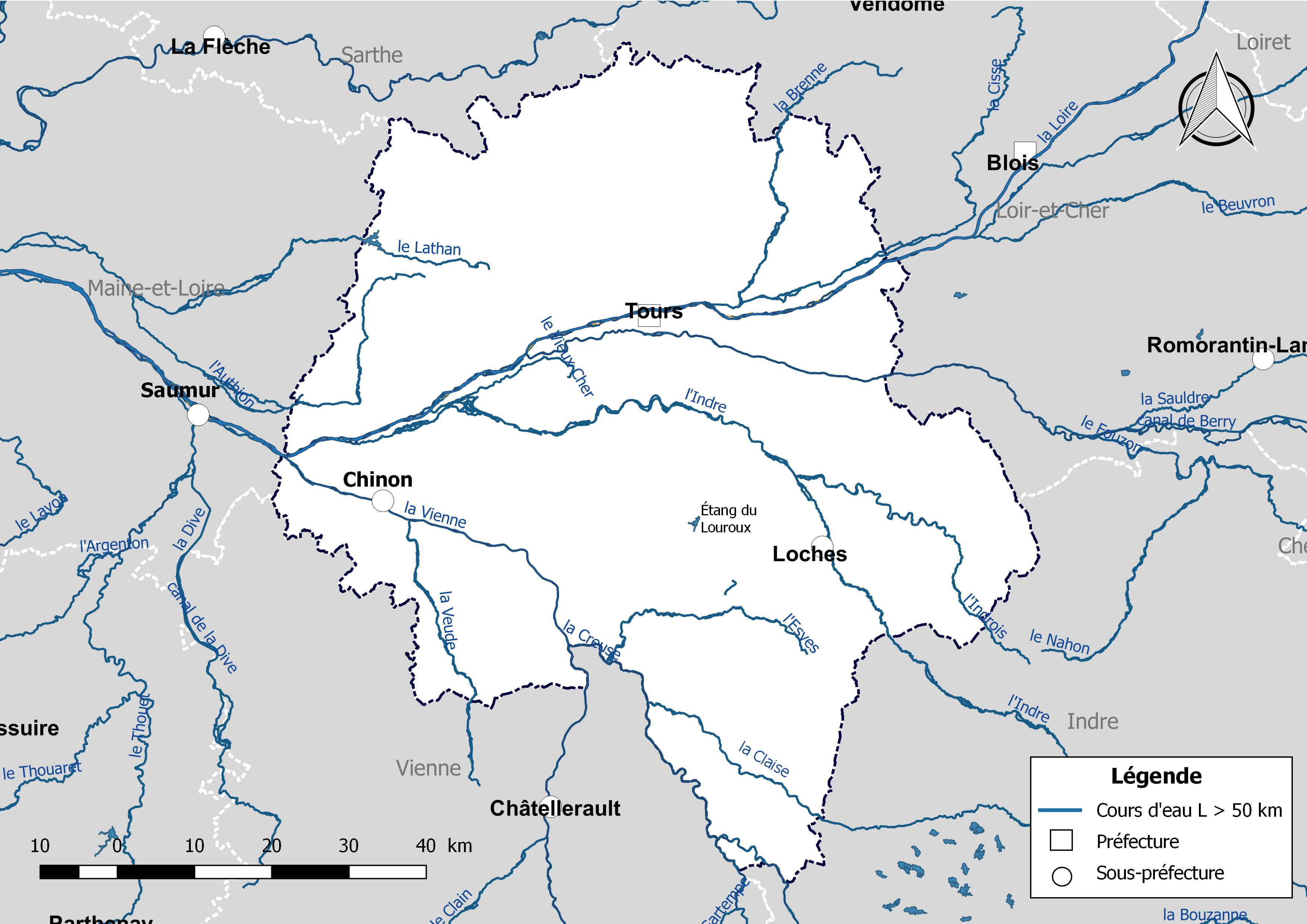 Carte des cours d'eau de longueur supérieure à 50 km drainant le département de l'Indre-et-Loire (France).